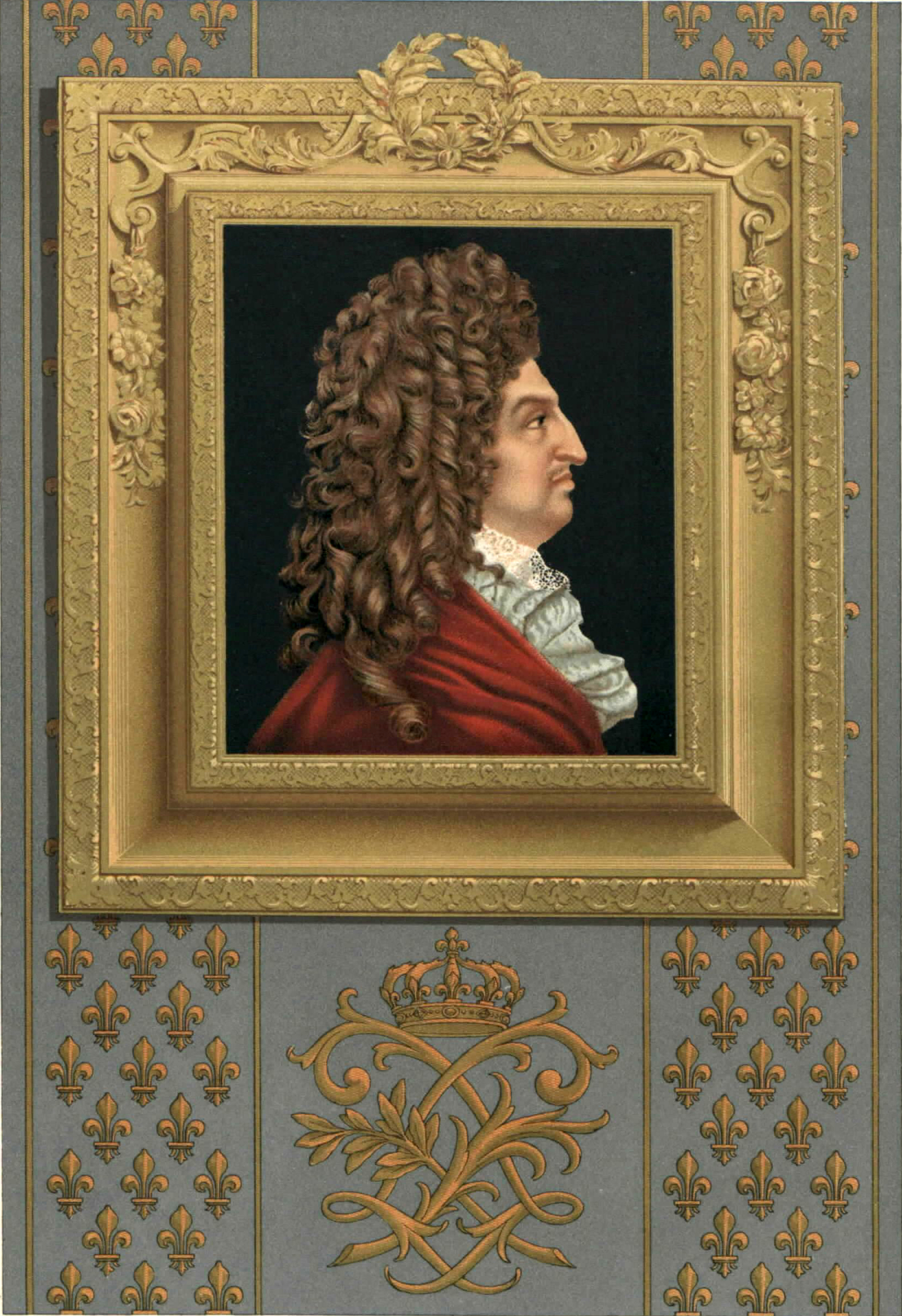 Louis XIV en 1706, figure en cire par Antoine Benoist (1632-1717), au palais de Versailles